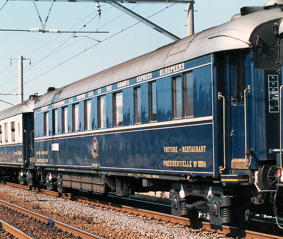 ORIENT EXPRESS '88 Voiture restaurant No.3354